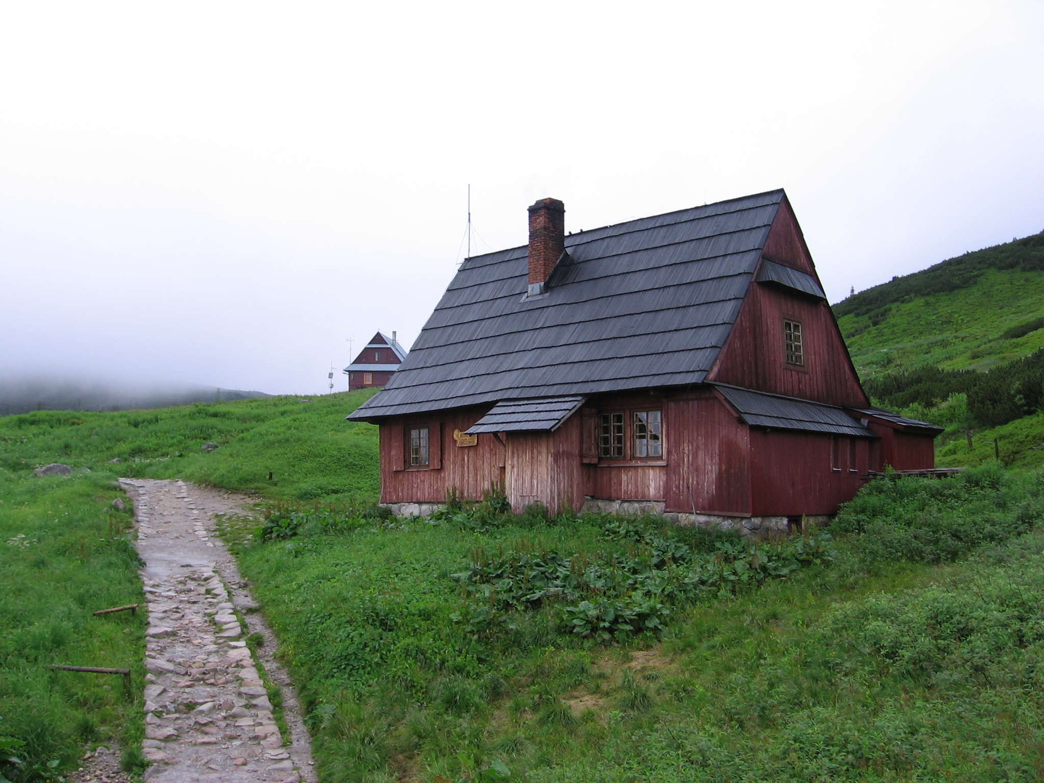 Hala Gąsienicowa - Centralny Ośrodek Szkolenia PZA "Betlejemka".